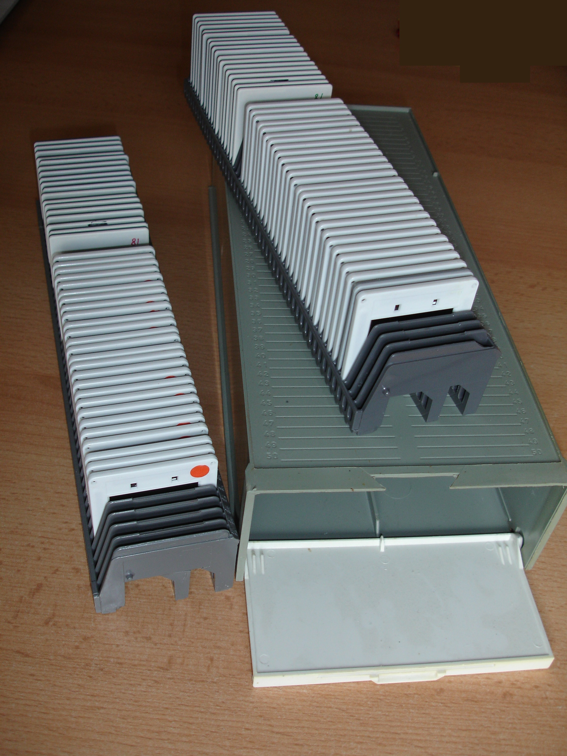 Stereo slides